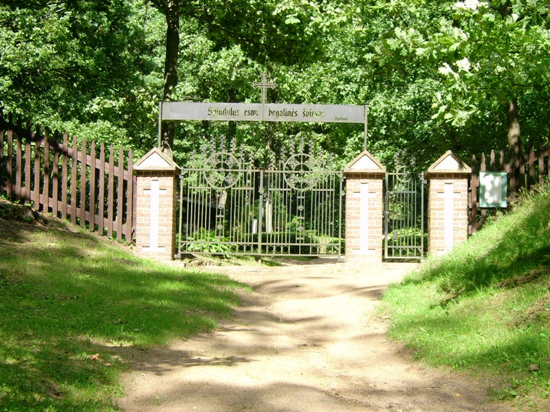 Bitėnų kapinaitės